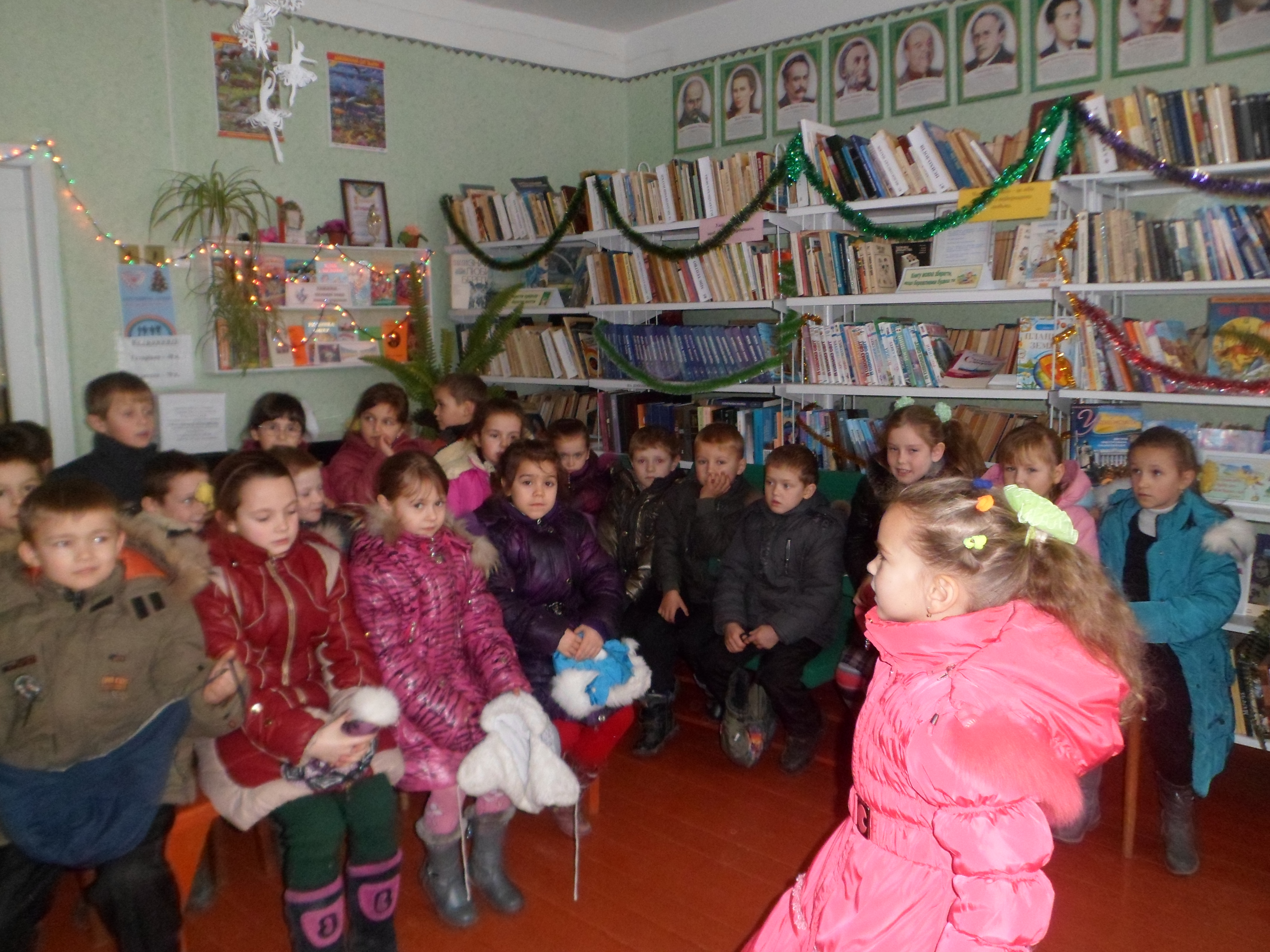 Масовий захід